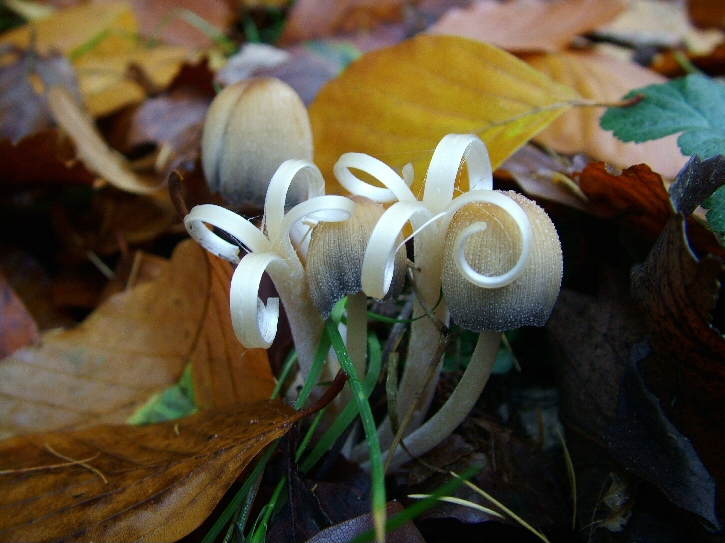 Pilz: Glimmertintling